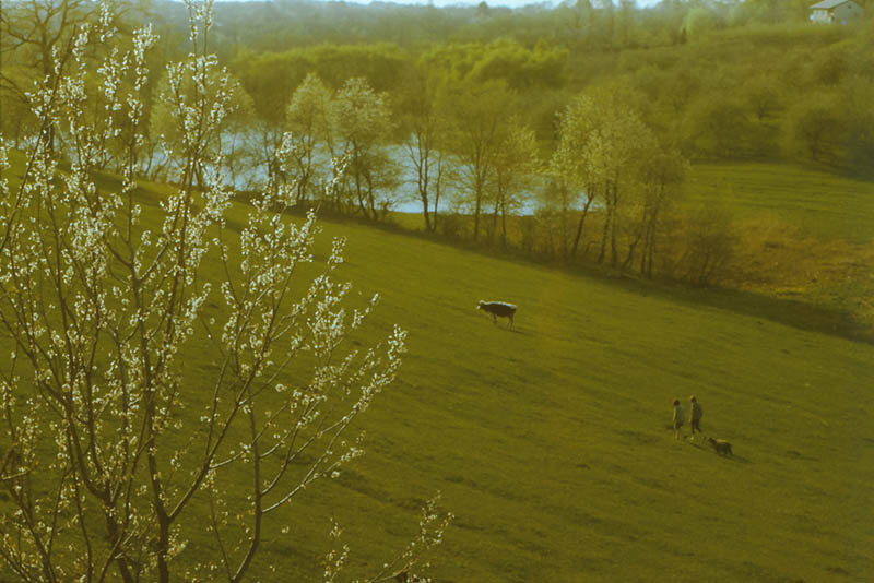 Ocnita District.